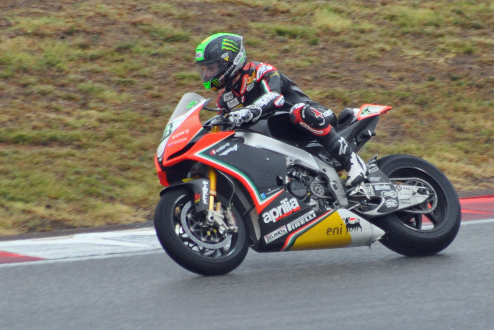 Autódromo Internacional do Algarve (2012-09-23), by Klugschnacker in Wikipedia (35) Eugene Laverty (IRL) auf Aprilia